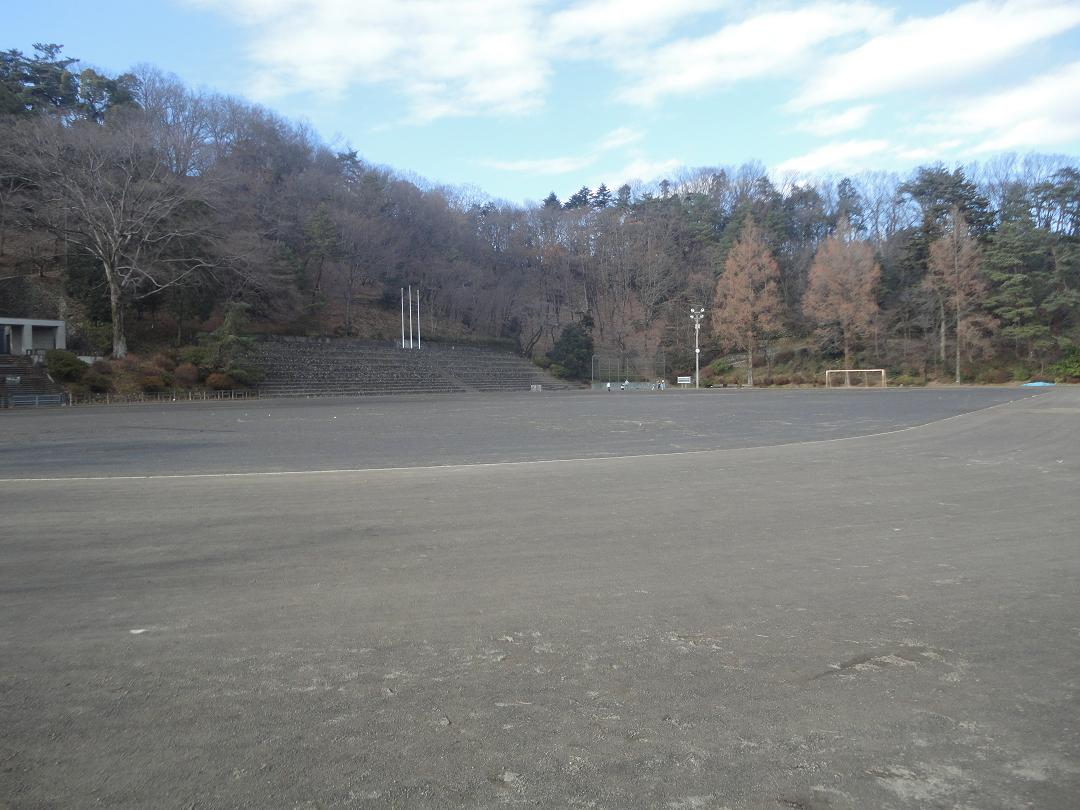 永山公園運動場（東京都青梅市）